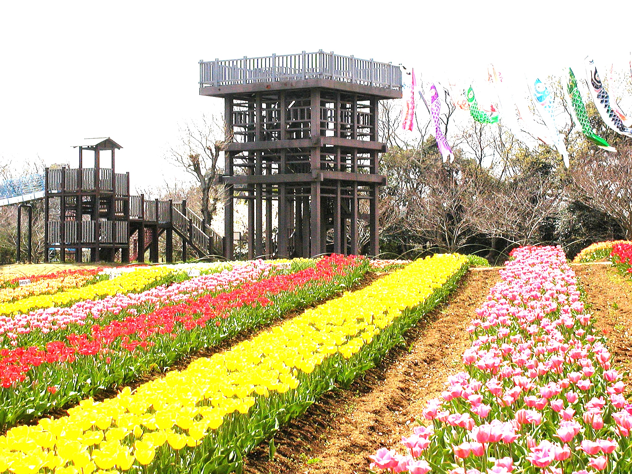 木原城跡のチューリップ